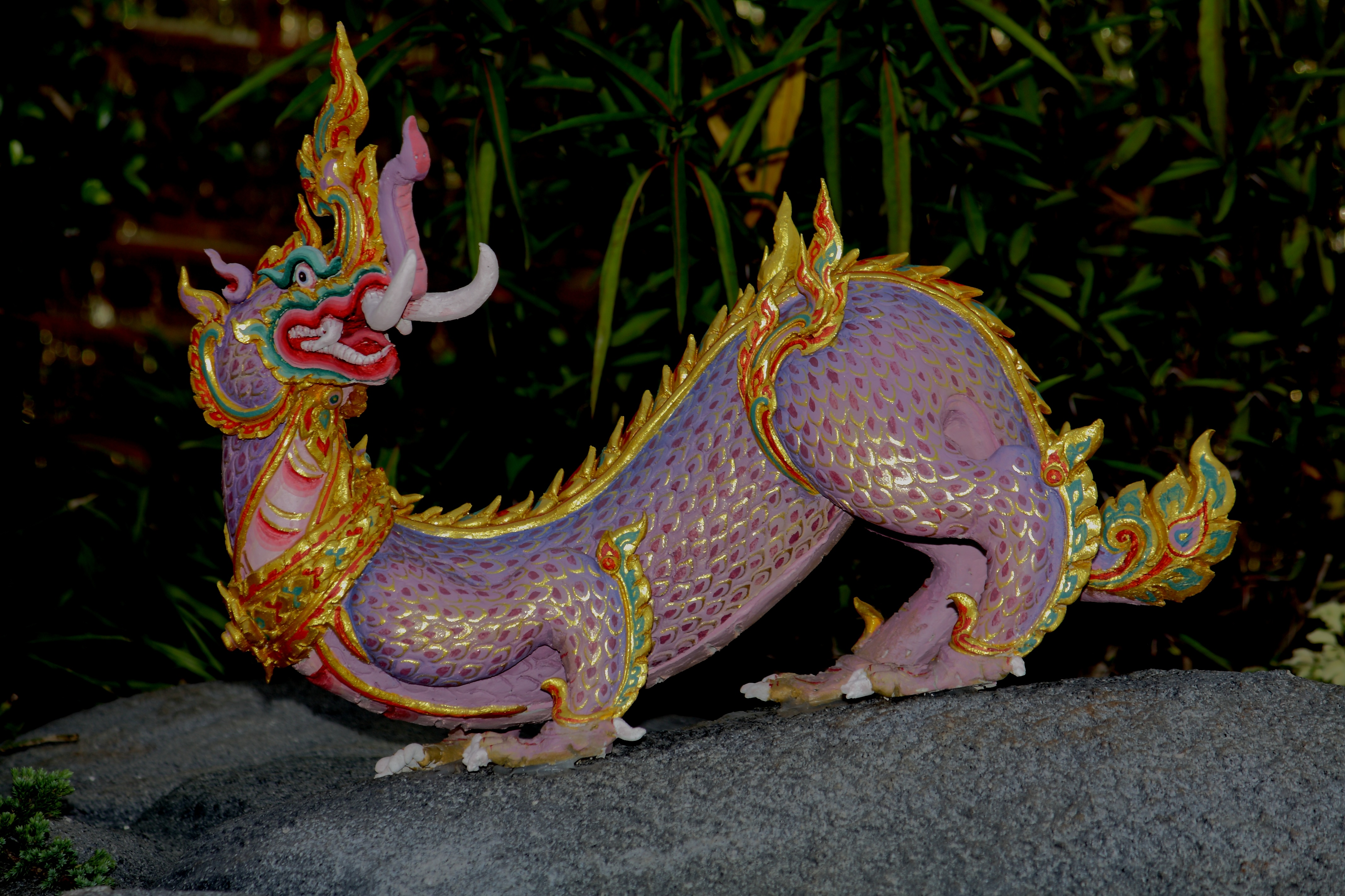 "มกรคชสีห์" หัวเป็นคชสีห์ ลำตัวและหาง เป็นมังกร พระเมรุและเครื่องประกอบพระเมรุในพระราชพิธีพระราชทานเพลิงพระศพสมเด็จพระเจ้าภคินีเธอ เจ้าฟ้าเพชรรัตนราชสุดา สิริโสภาพัณณวดี ณ พระเมรุ ท้องสนามหลวง วันจันทร์ ที่ ๙ เมษายน พุทธศักราช ๒๕๕๕